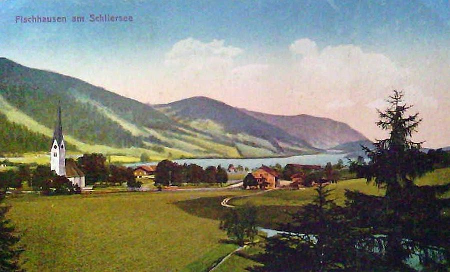 Fischhausen auf einer Ansichtskarte von 1919